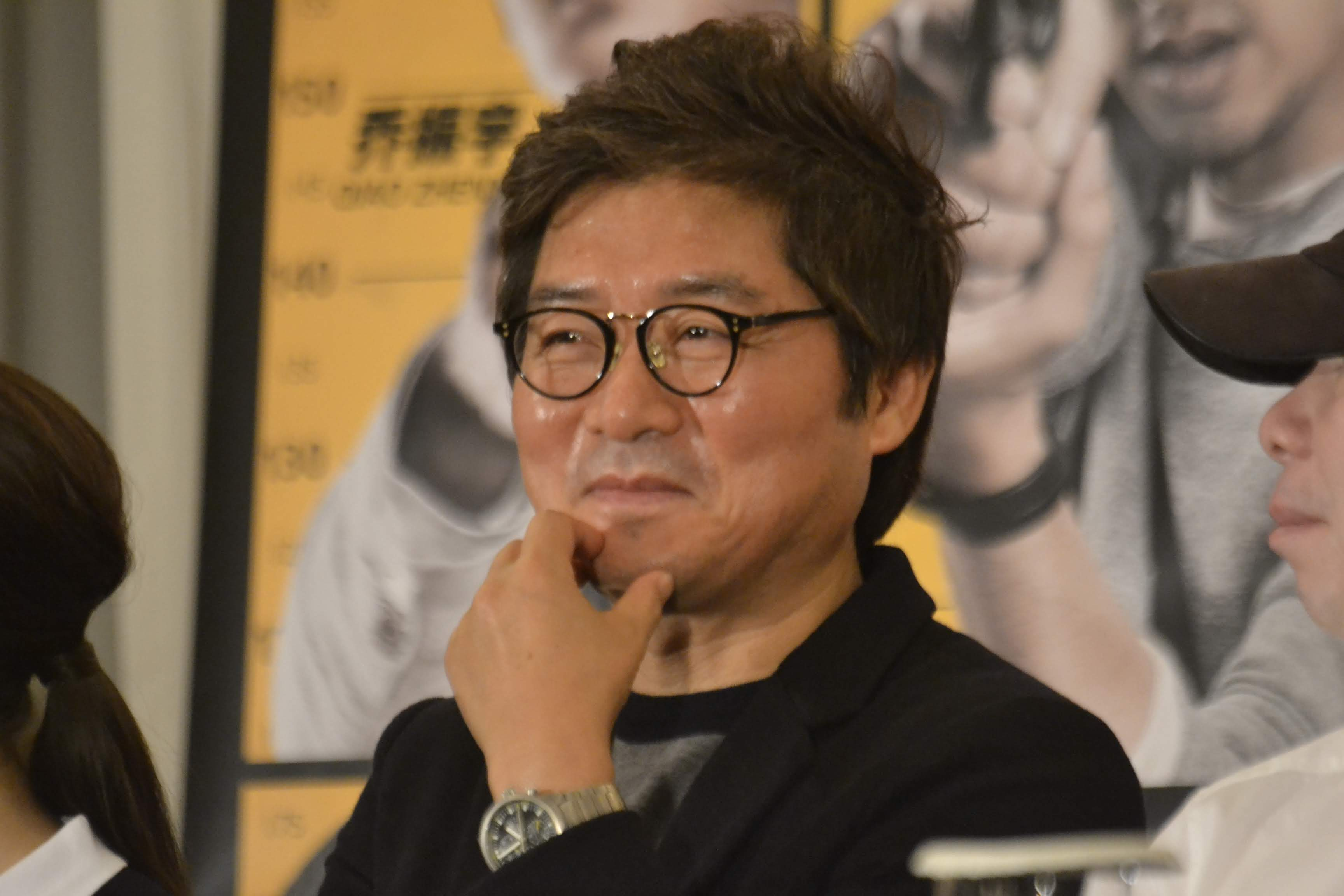 2015년 부산국제영화제 강제규 감독